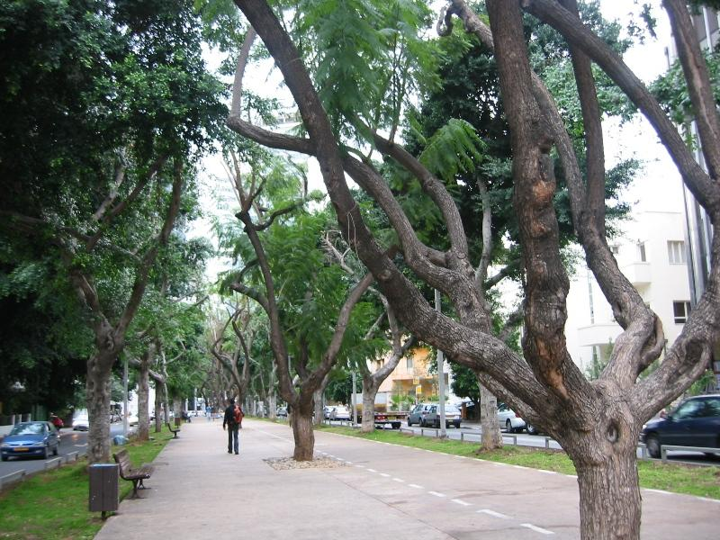 עצי השדרה העתיקים